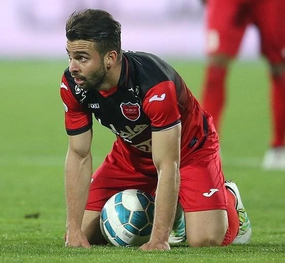 سروش رفیعی در مسابقه پرسپولیس و استقلال خوزستان